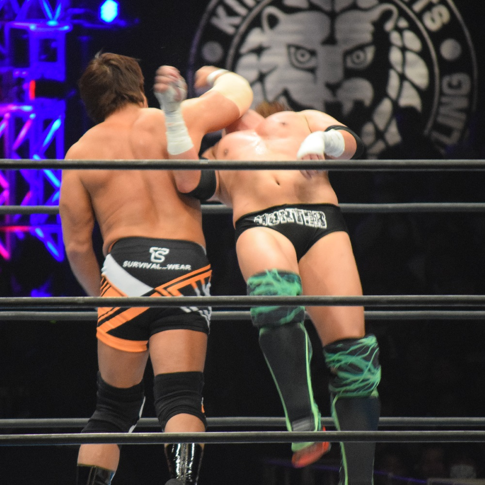 2017年2月11日 大阪府立体育会館 「THE NEW BEGINNING in OSAKA」 ヨシタツにラリアットを放つ小島聡